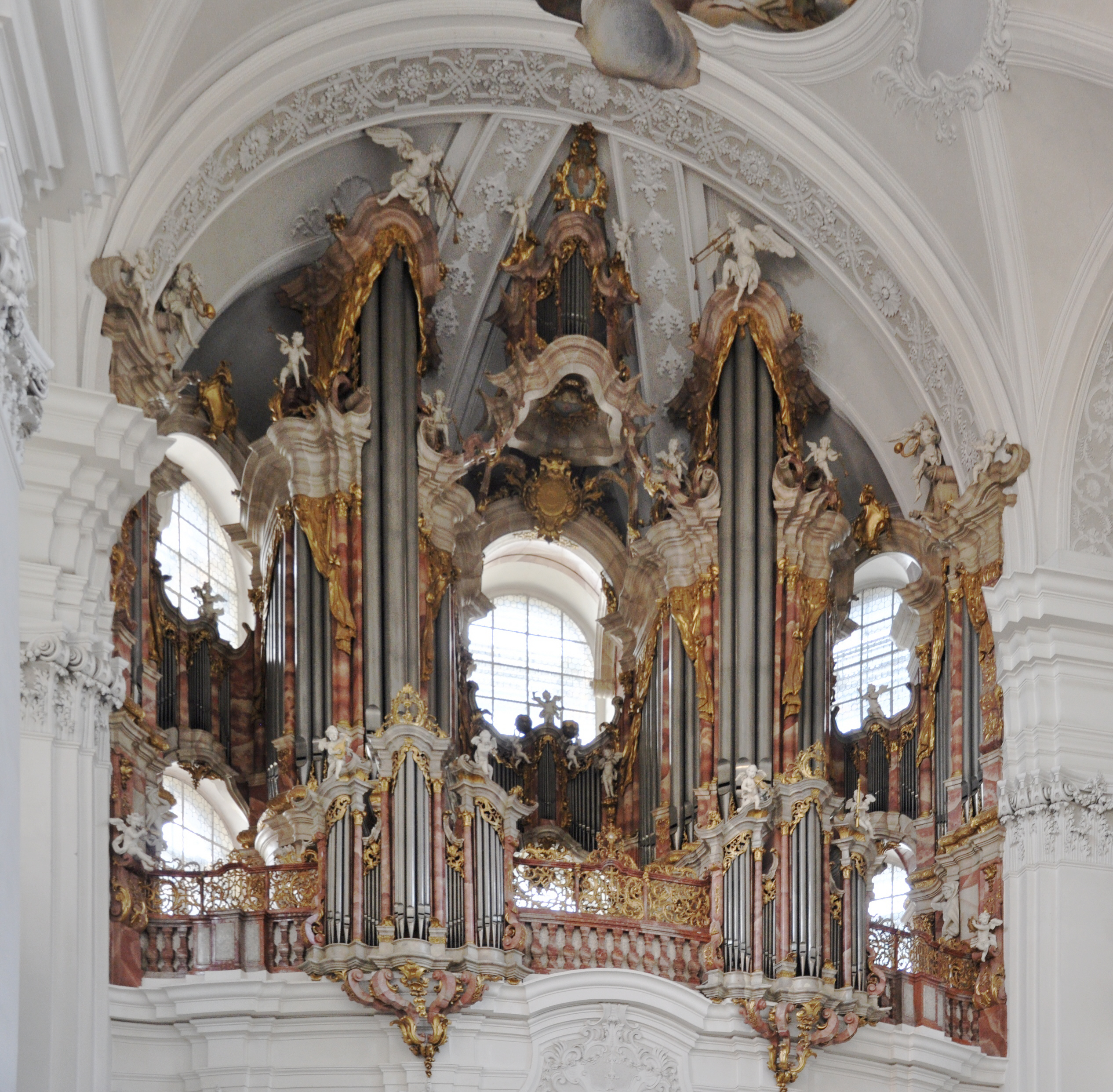 Weingarten, Basilika, Gabler-Orgel